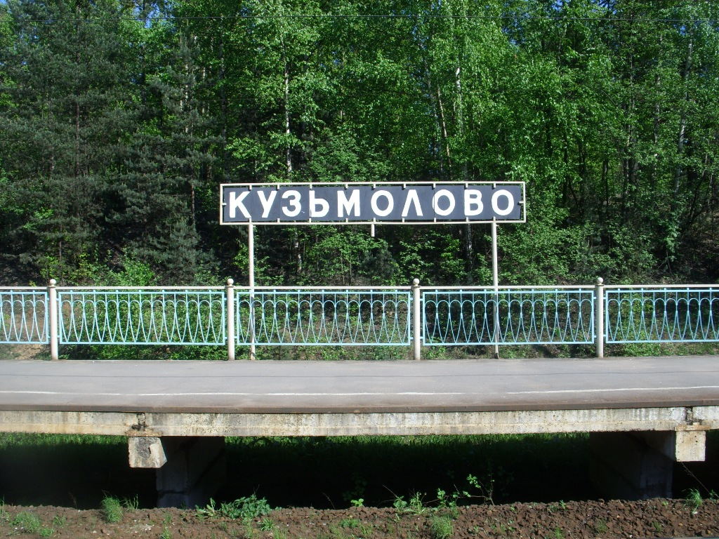 Кузьмолово, указатель старого образца